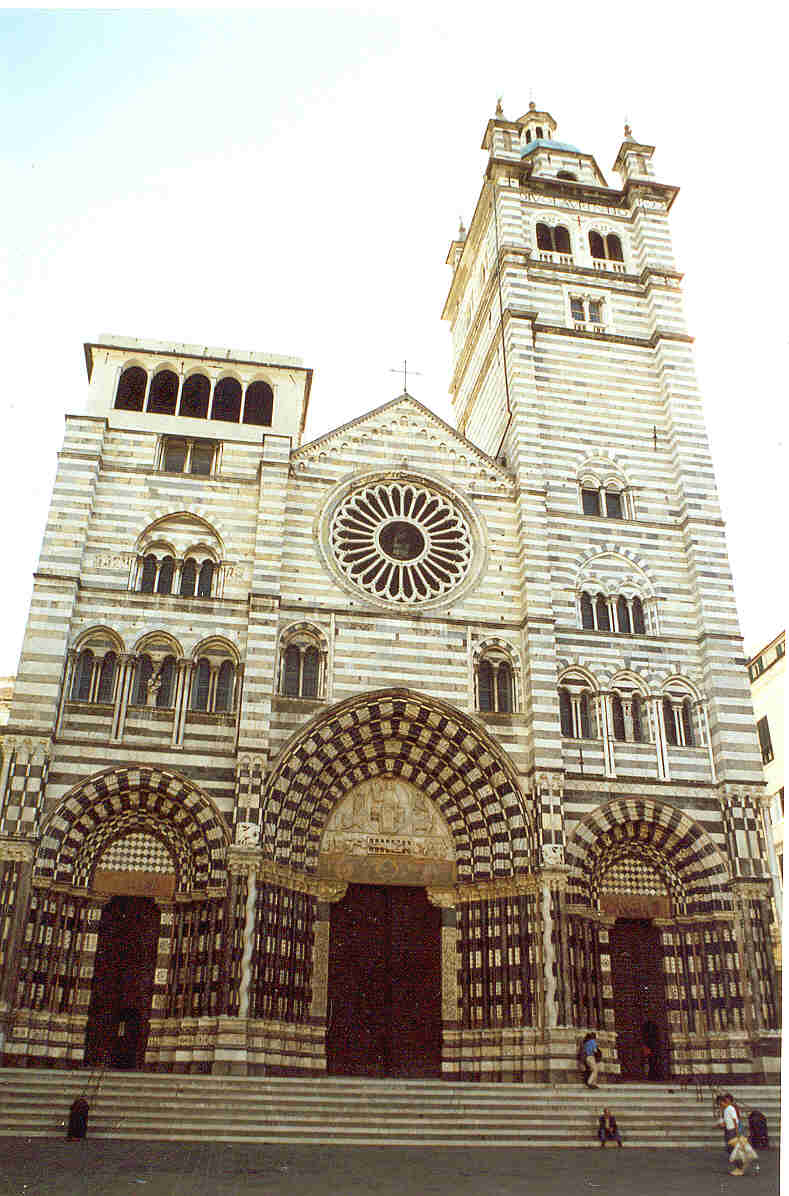 Facciata della cattedrale di San Lorenzo a Genova. Immagine creata da Rinina25 & Twice25 Luogo: Genova Data: Ottobre 2001